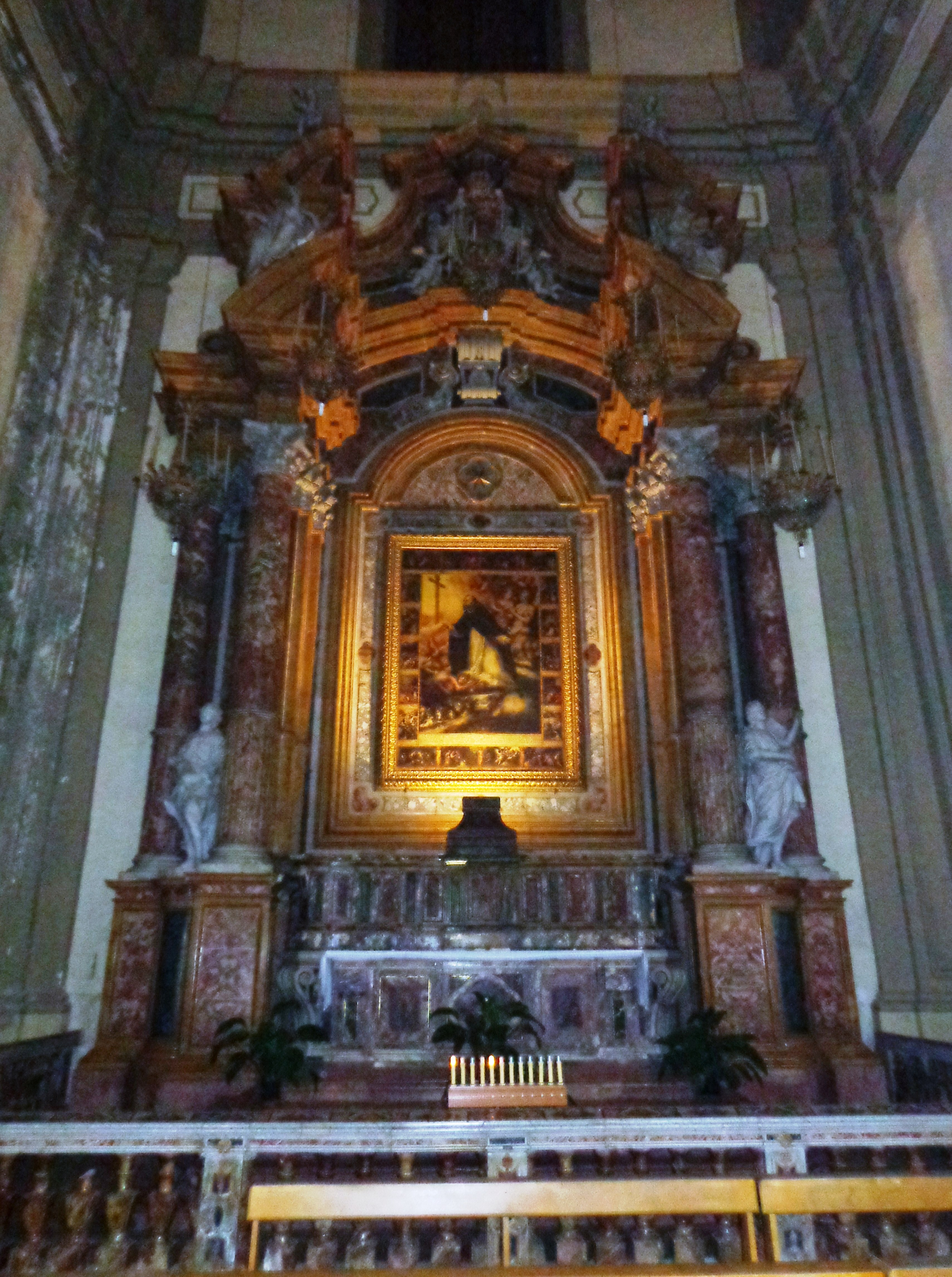 San Domenico PA 05